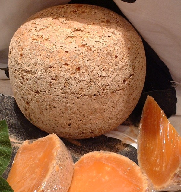 Mimolette vieille étuvée, entière et en tranches